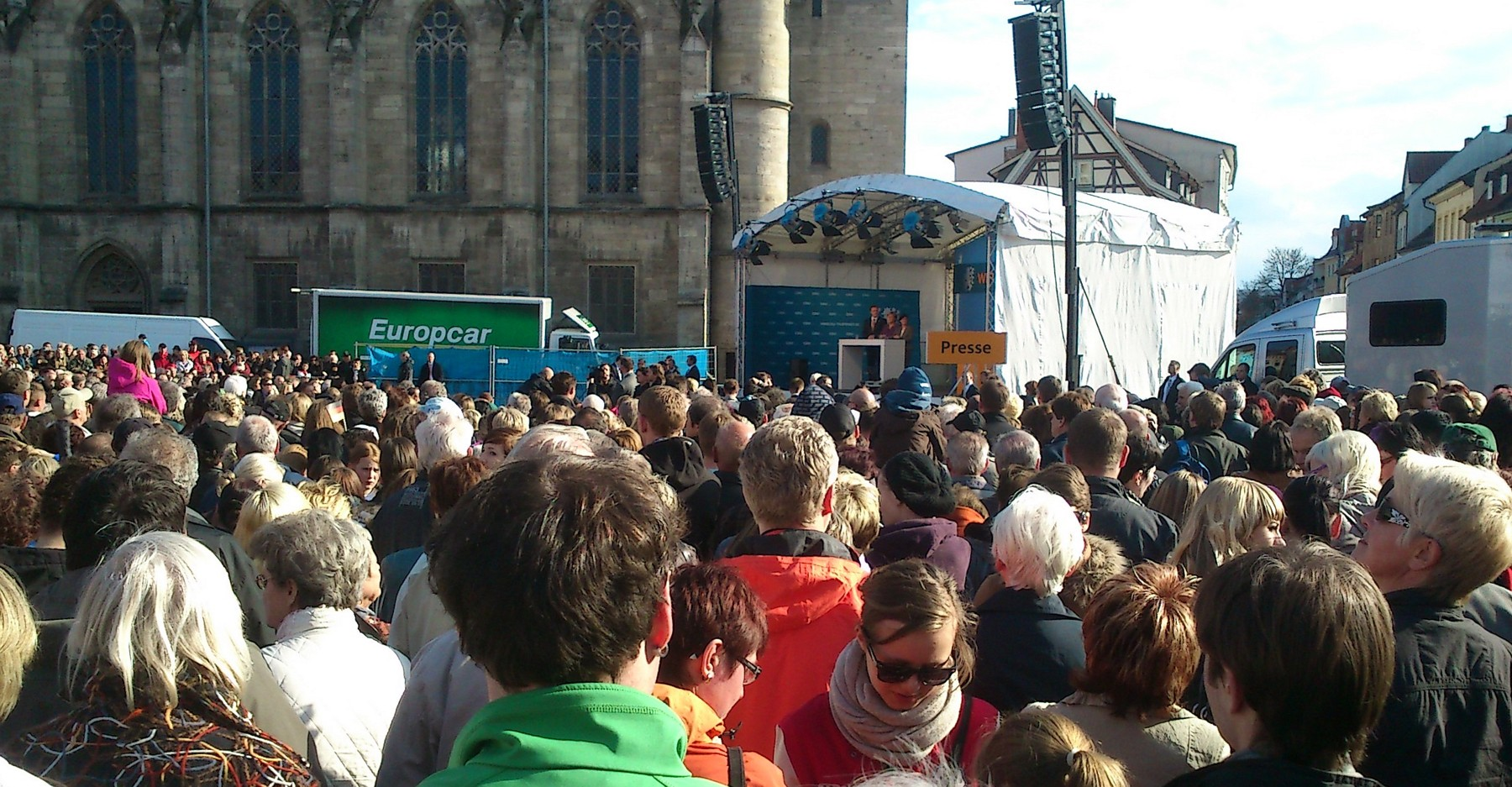 Marlktplatz in Meiningen - Wahlveranstaltung mit Angela Merkel im April 2012